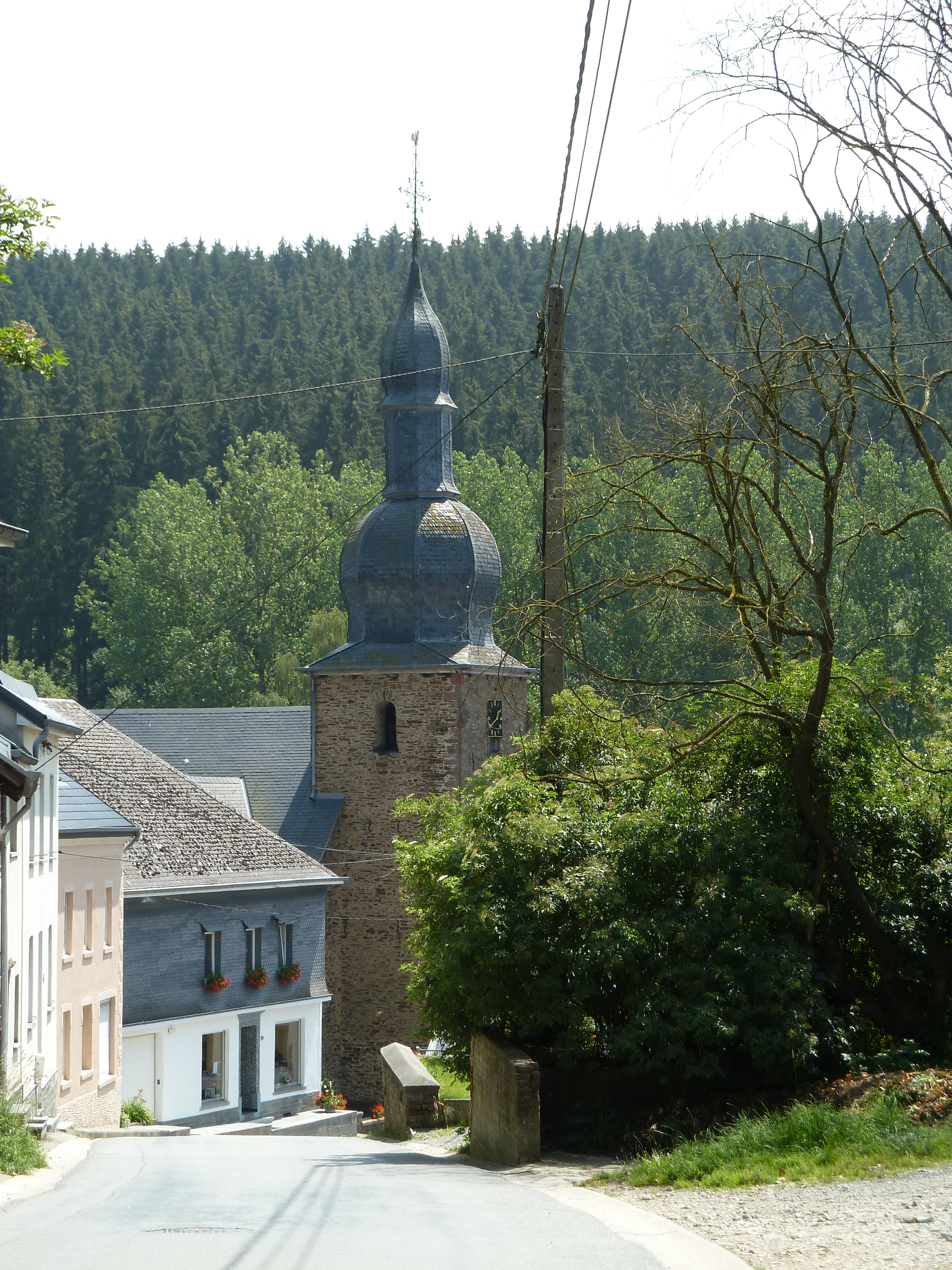 St Stephanuskerk, Burg-Reuland, Belgique